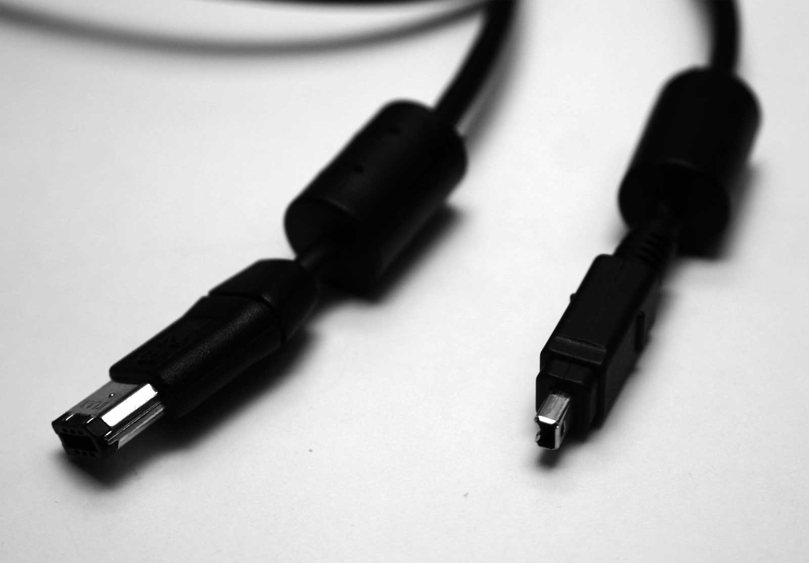 Conector Firewire Versión 6 pines (izq) y versión 4 pines (dch) es: Conector IEEE 1394 -también conocido como Firewire o i.Link-. Versión de 6 pines (izq) y versión de 4 pines (dch). Imagen propia. Dominio público. en: IEEE 1394 -aka Firewire or i.Link- connector. 6-pin (left) and 4-pin (right) versions. Own image. Public domain.